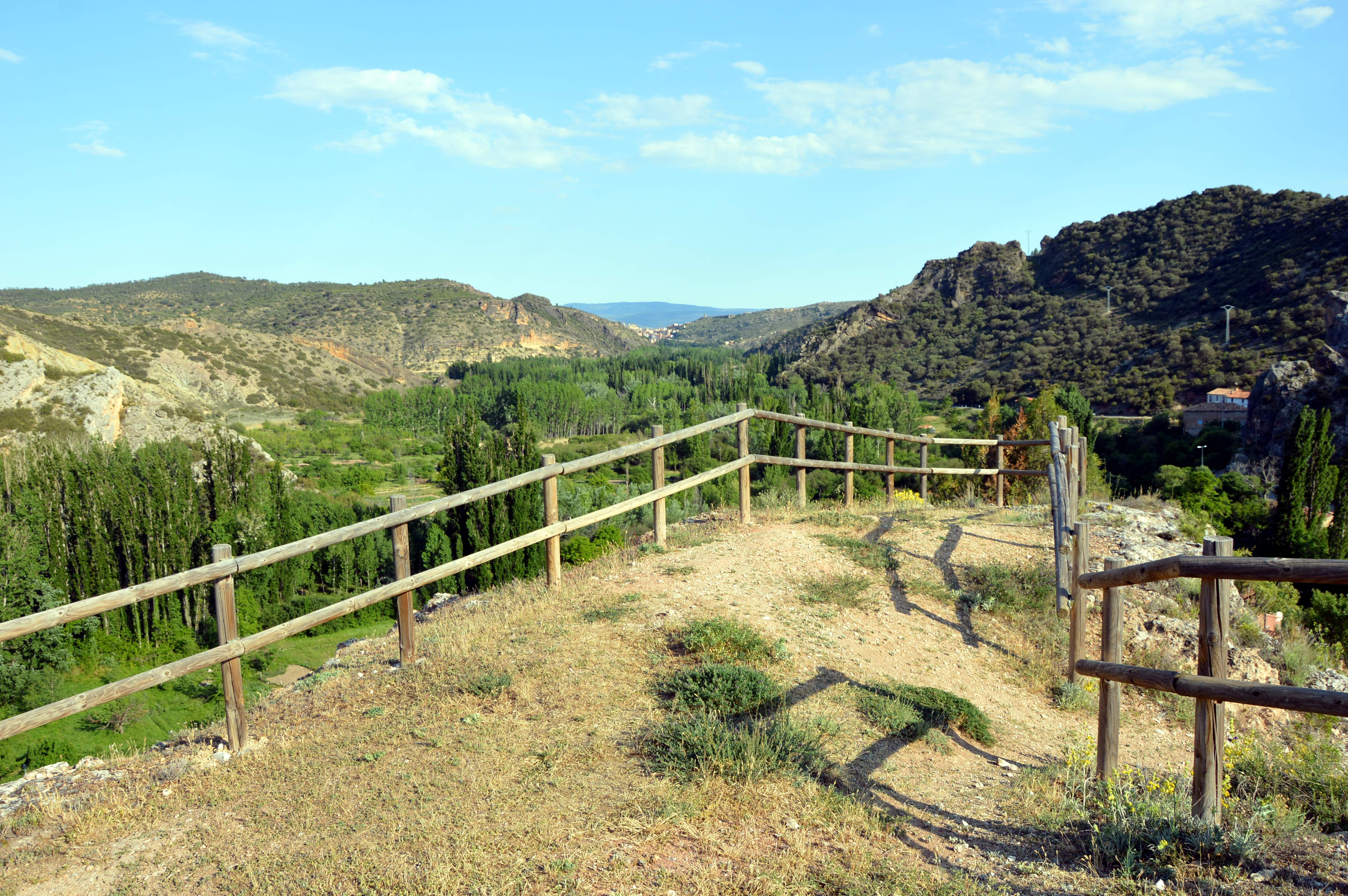 Vista parcial (meridional) del Mirador del castillo de El Cuervo (Teruel), con detalle de las barandas protectoras.